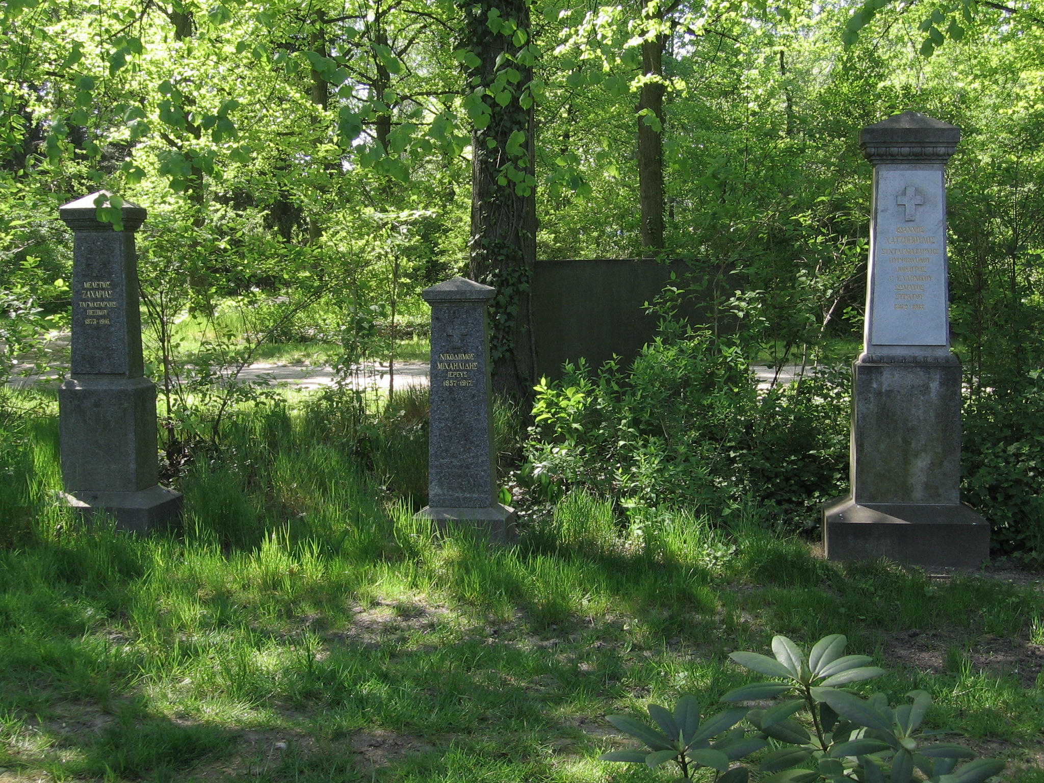 Nagrobki Greckich jeńców na cmentarzu w Görlitz